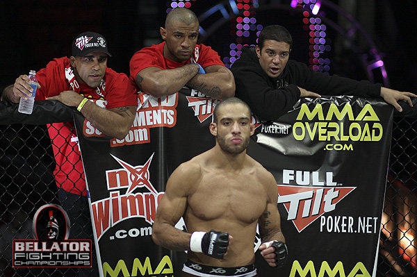 photo du combat entre Norman Paraisy et Dave Menne au Bellator